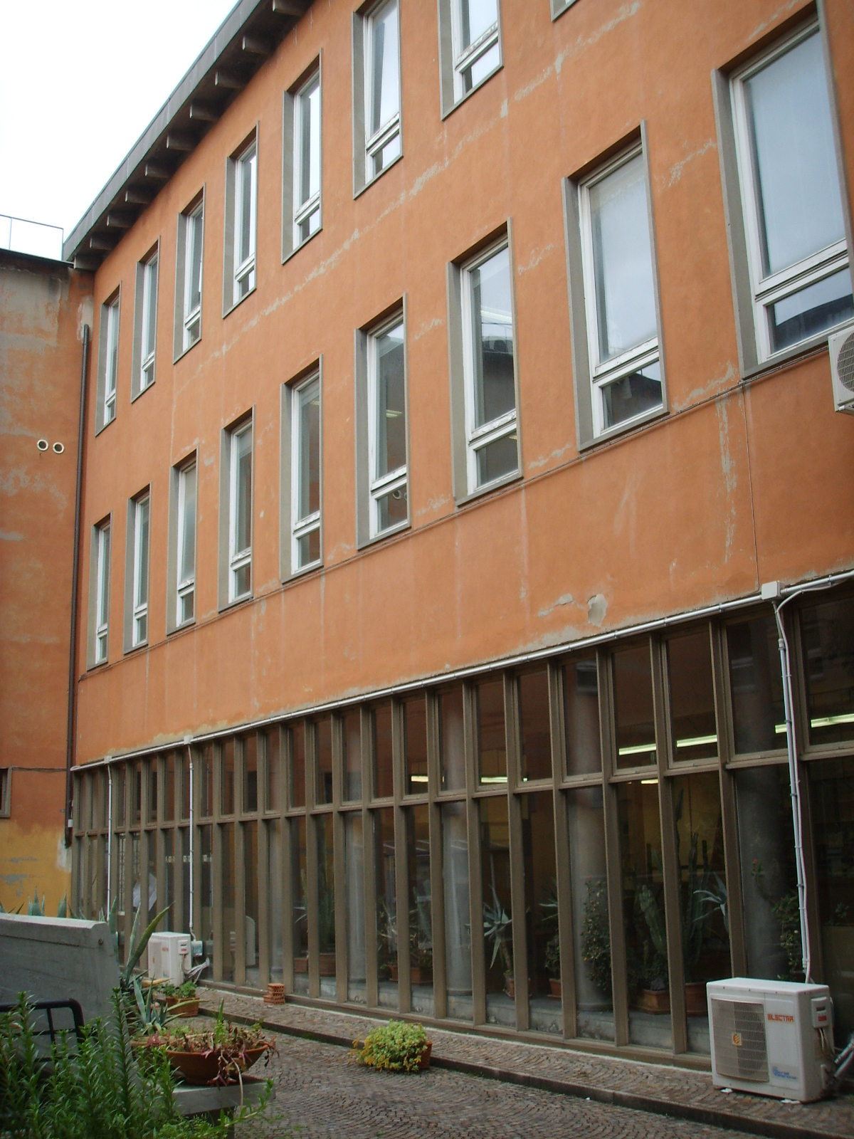 Facoltà di lettere e filosofia, cortile